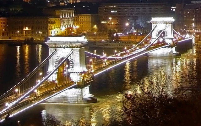 Kettenbrücke in Budapest bei Nacht, größere Version Contents 1 Fotograf 2 Summary 3 Copyright 4 Licensing 5 Original upload log Fotograf Matti Parkkonen Summary Free Image Archive Copyright "for unlimited free use", d. h. gemeinfrei